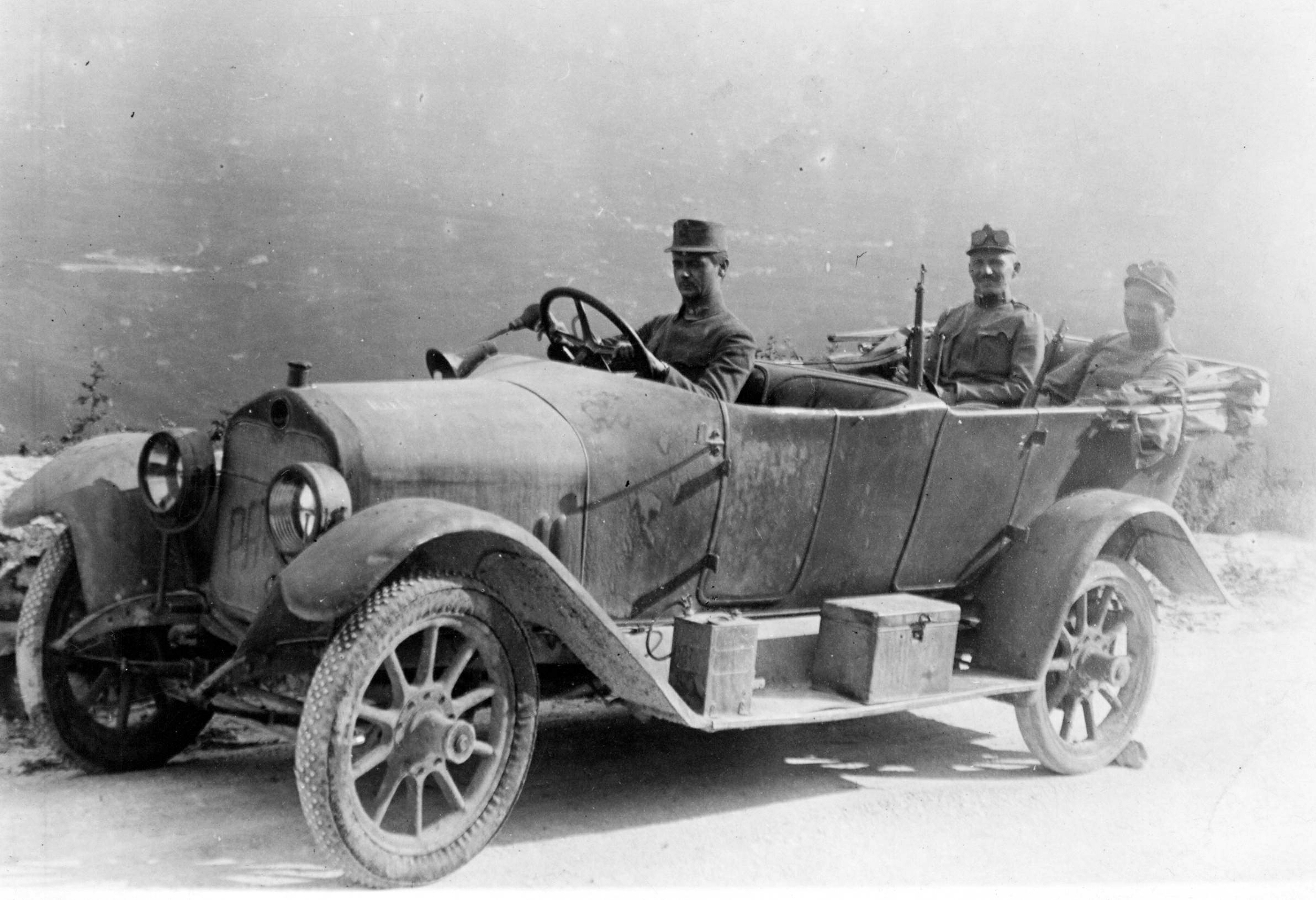 Praga személyautó az olasz fronton. Location: Italy Tags: First World War, automobile, Czech brand, Praga-brand, weapon, gun Title: Praga személyautó az olasz fronton.